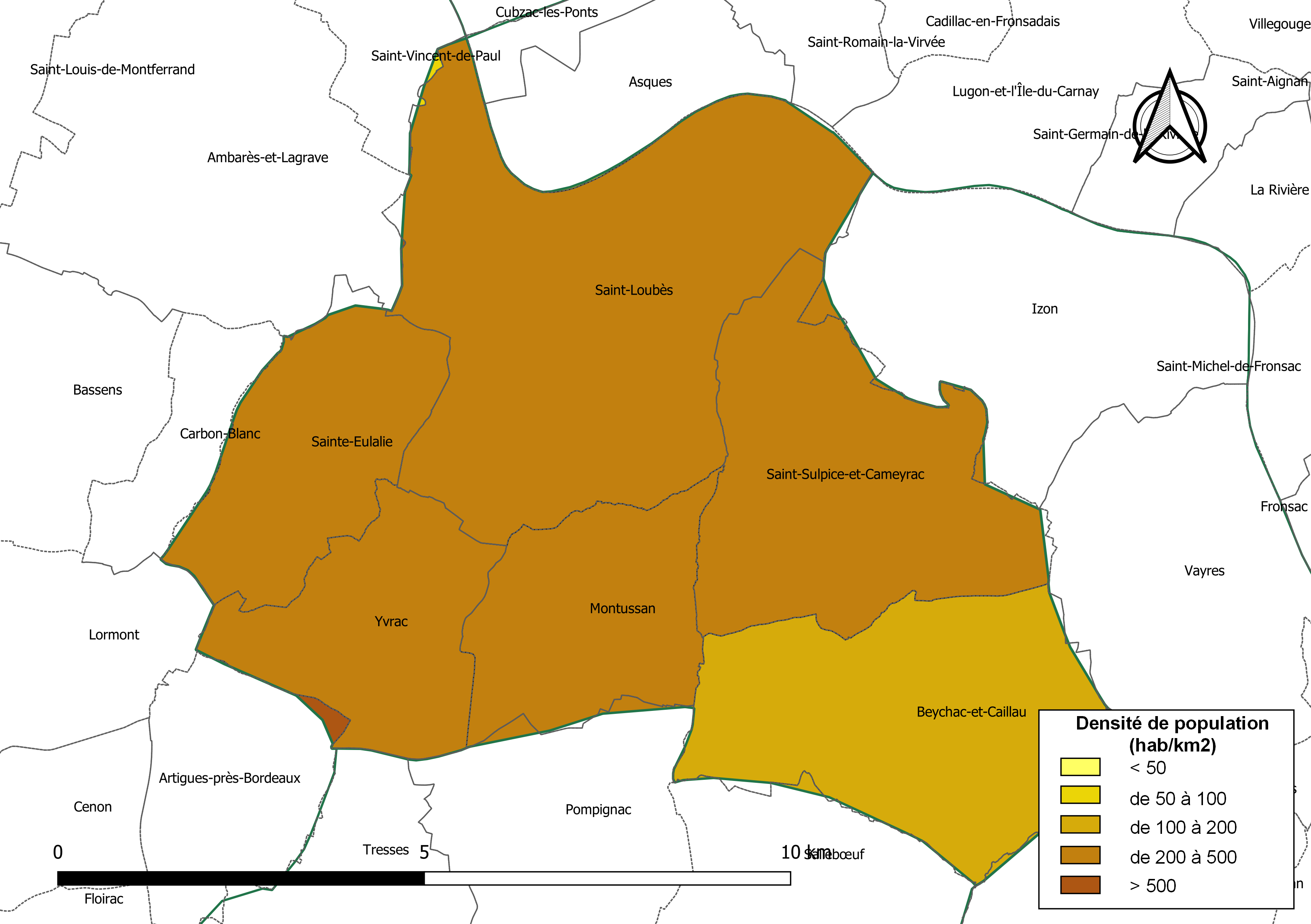 Carte des densités de population (millésimée 2016) des communes de la communauté de communes la Communauté de communes du Secteur de Saint-Loubès, département de la Gironde, France. Composition au 1er janvier 2019.